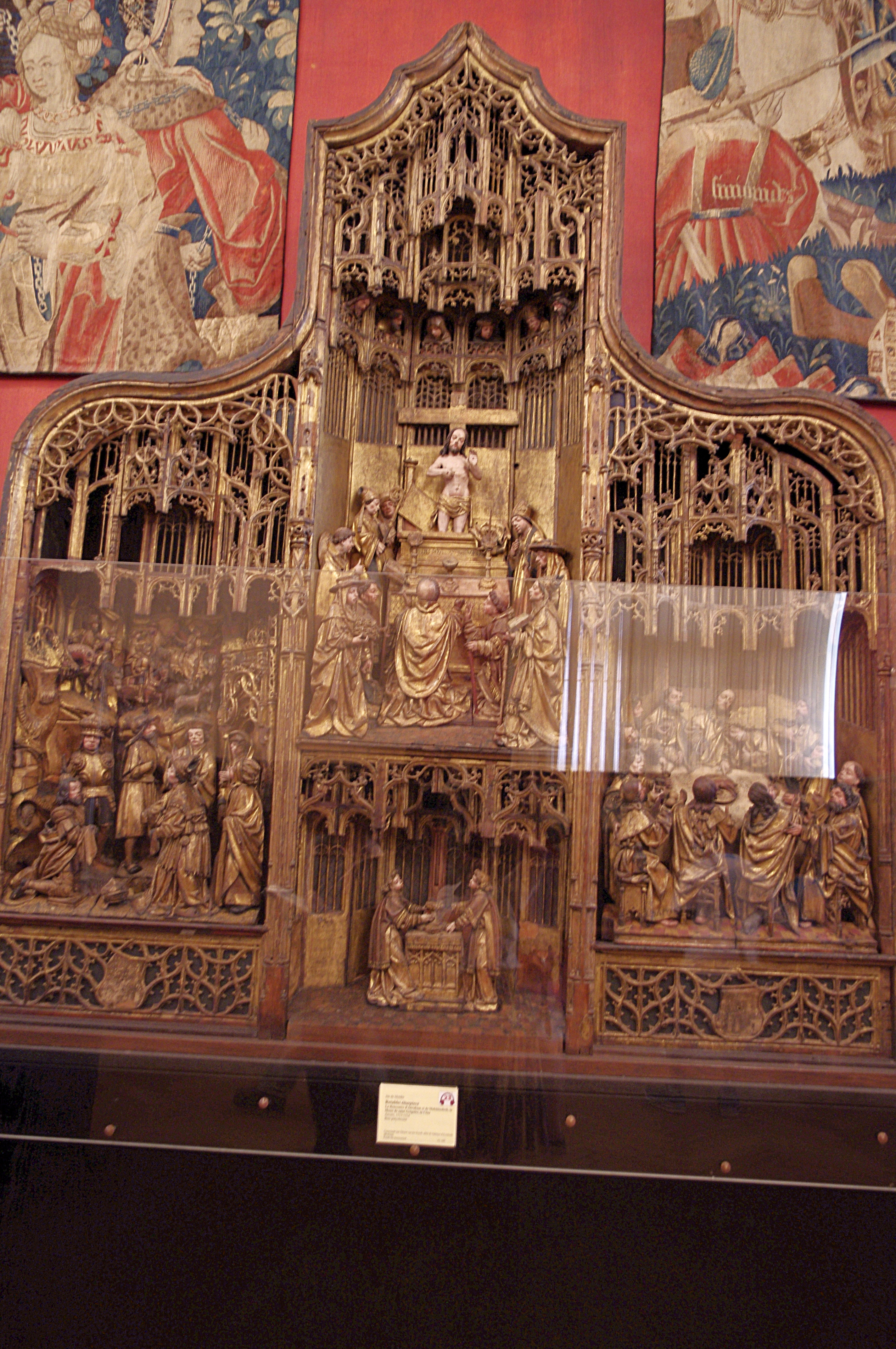 Musée de Cluny, Paris. - Jan de Molder, retable, La rencontre d'Abraham et de Melchisedech, la messe de saint Grégoire, la Cène. Anvers 1513-1514.